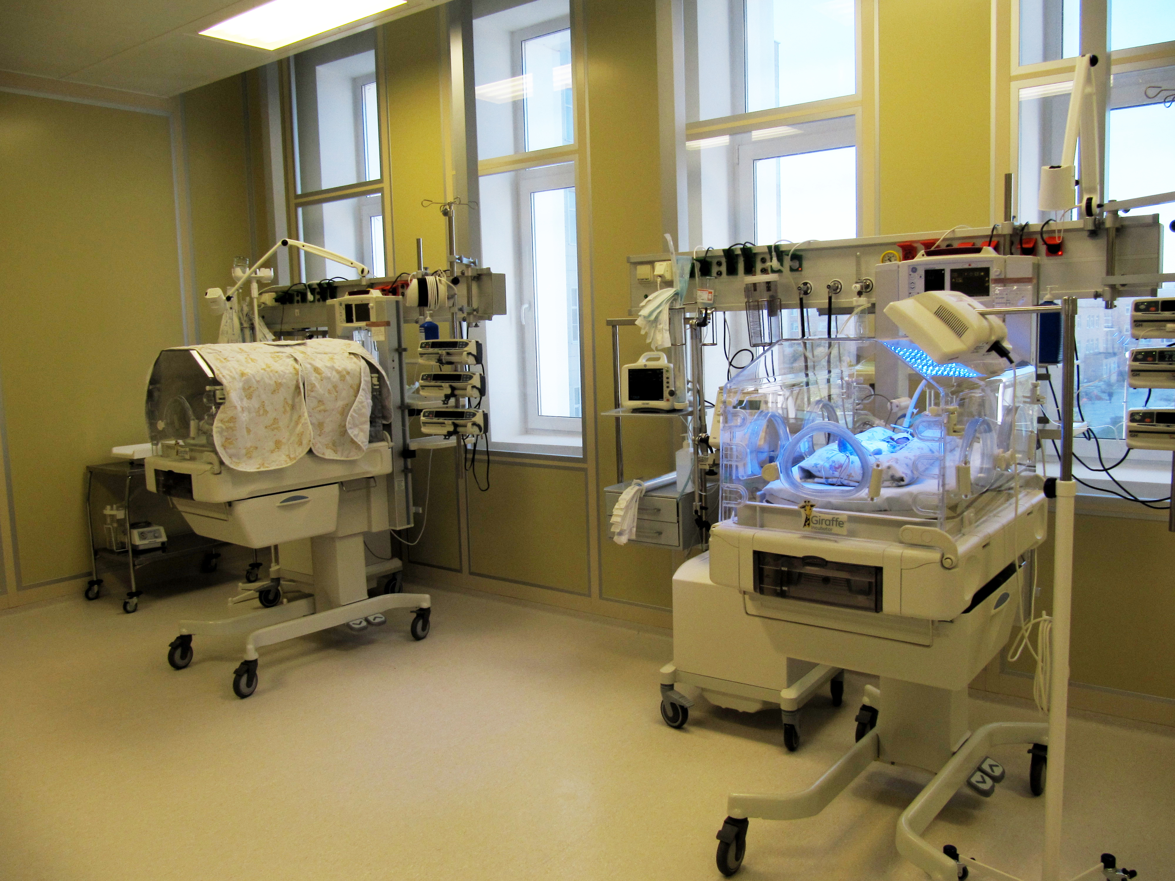 Палата интенсивной терапии новорожденных в Рязанском областном перинатальном центре